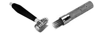 „Lebenswecker“ nach Baunscheidt (Baunscheidttherapie)